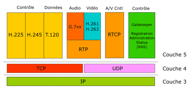 Image perso crée sous Inkscape!